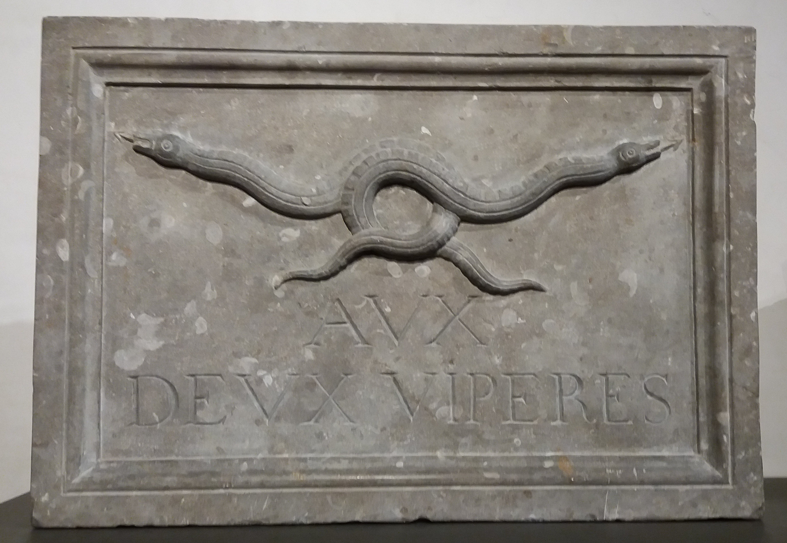 Enseigne aux deux vipère de l'imprimeur Antoine Julliéron à Lyon. Calcaire avec traces de polychromie du 17e siècle, provenant du 7 rue Raisin (aujourd'hui rue Jean de Tournes). Musées Gadagne.